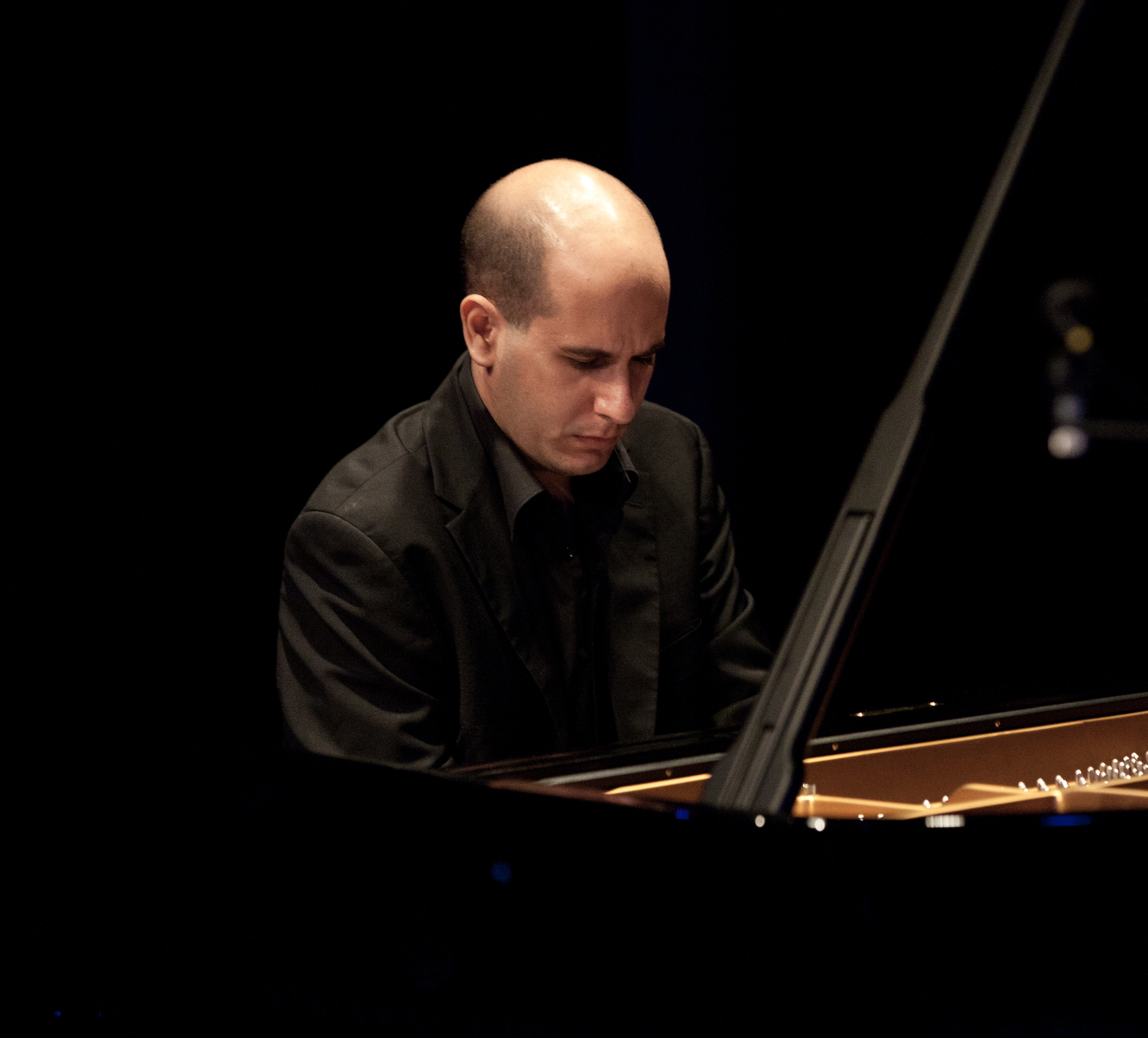 Alfonso Gómez, pianista español.